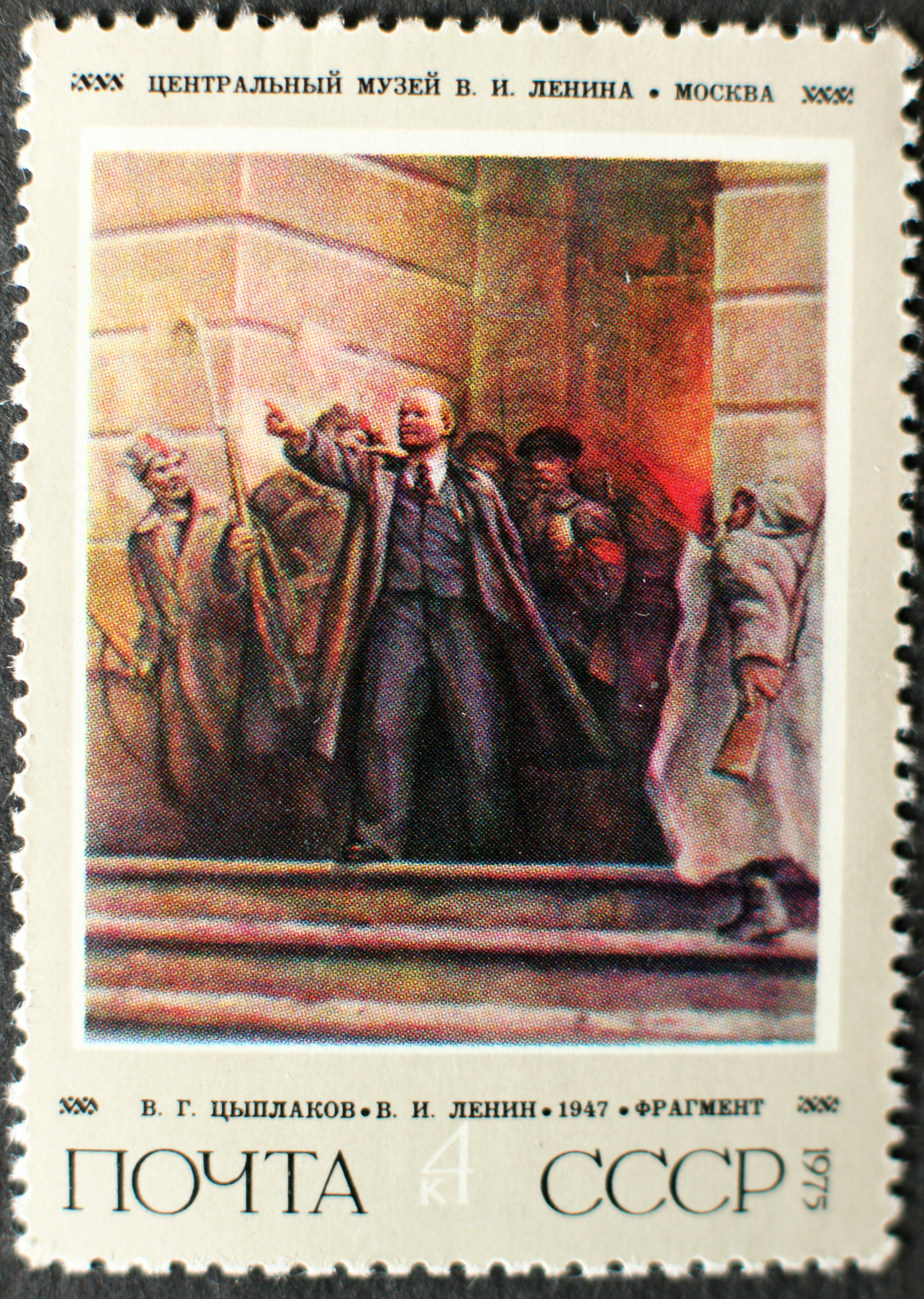 Briefmarke, Sowjetunion